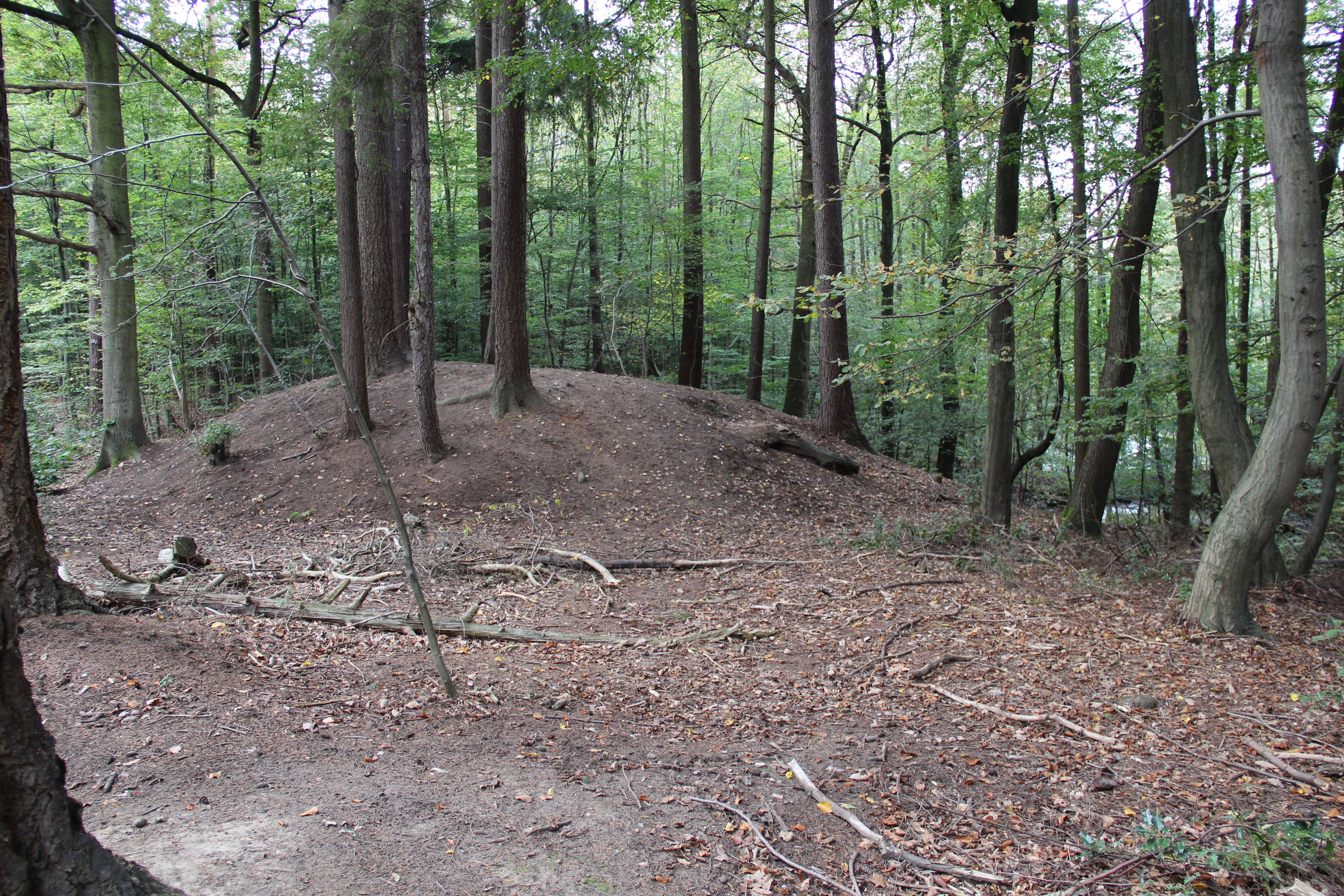 Einer der Grabhügel im Ennert, Niederholtorf This is a photograph of an archaeological site. 6